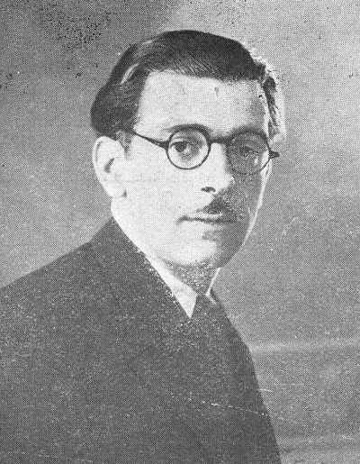 Ramón Martínez López, fotografía en Vida Gallega 1933